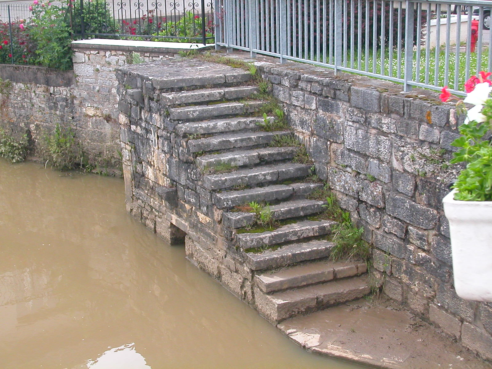 joli escalier extérieur à volée droite qui descend au Salon (gros orage l'avant-veille de cette photo)